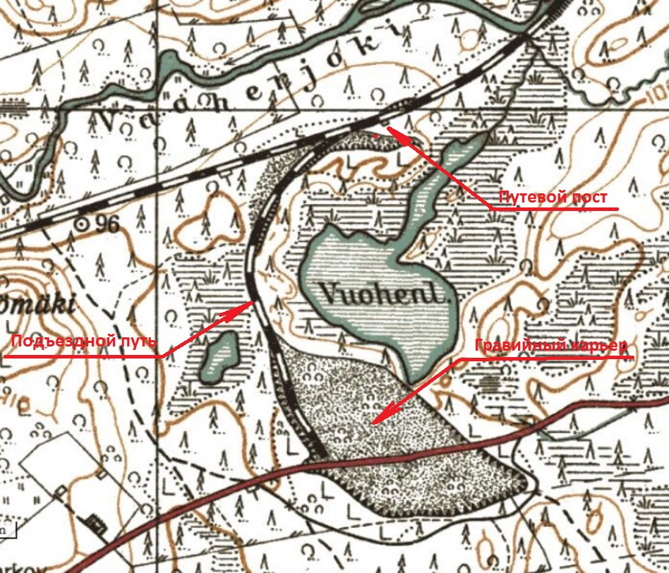 ВААХЕРЙОКИ путевой пост